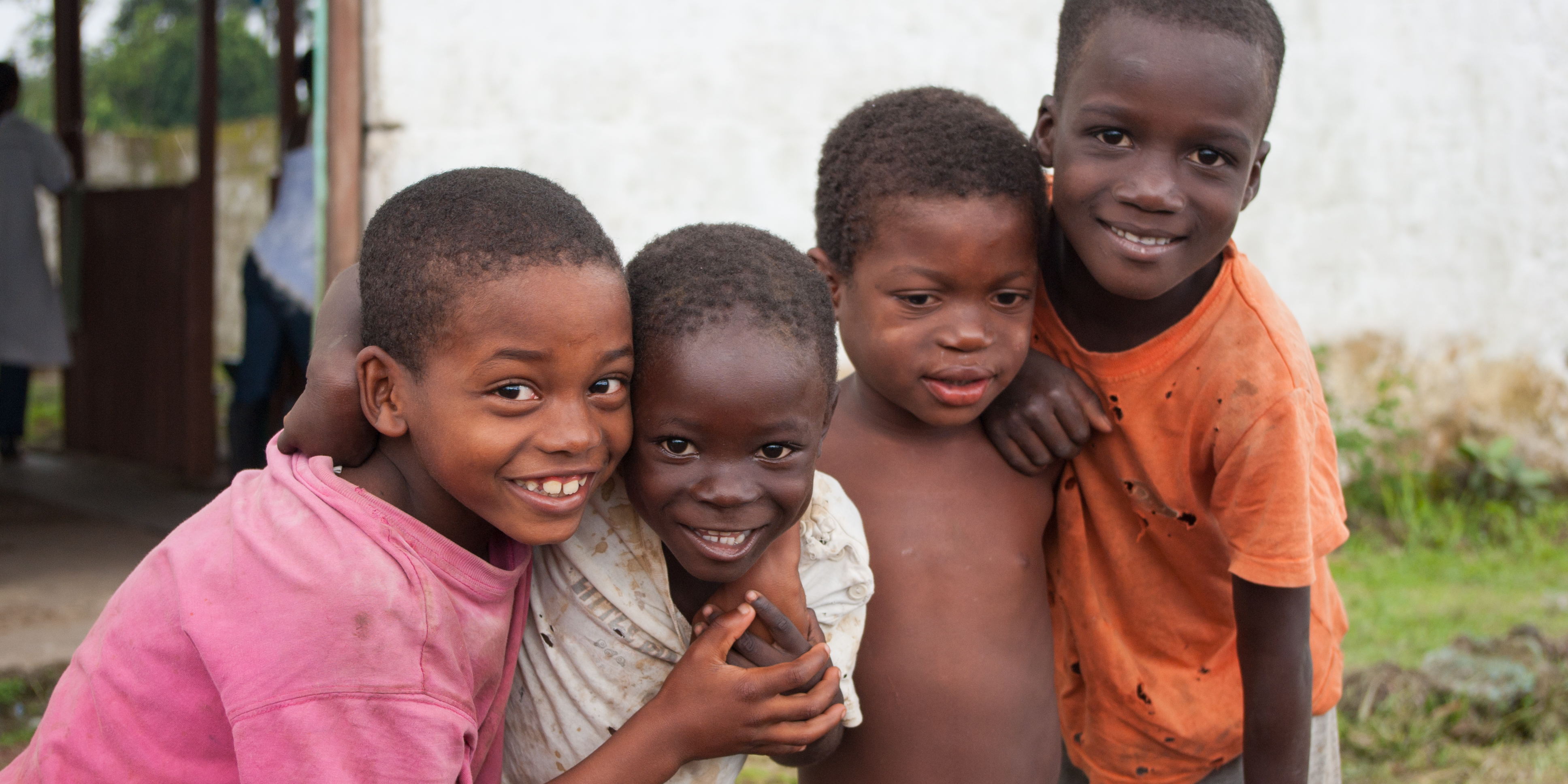 2011-SaoTome-14